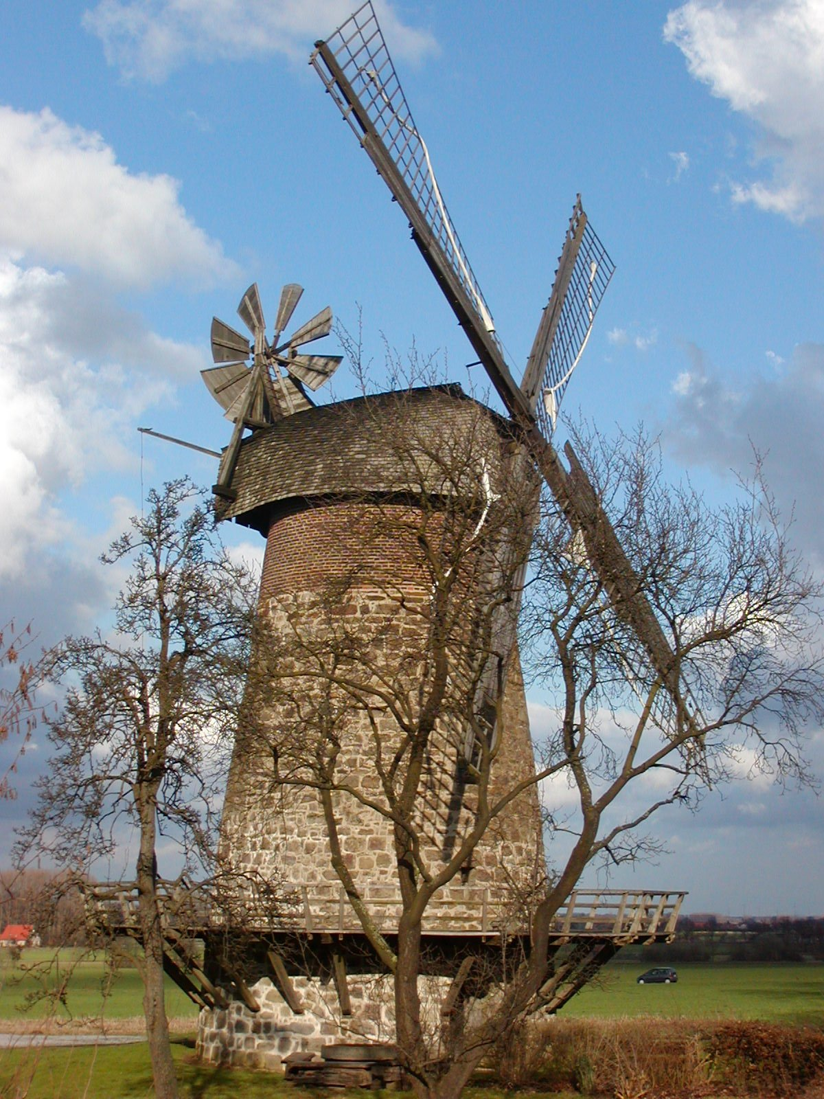 Die Windmühle Königsmühle in Eilhausen, Stadt Lübbecke, Kreis Minden-Lübbecke, Nordrhein-Westfalen. Die Mühle ist Teil der Westfälischen Mühlenstraße. Der Galerieholländer wurde 1748 erbaut und hat einen aus Sandsteinen gemauerten runden Mühlenturm. Die Mühle hat eine Windrosenanlage und windgängige Segelgatterflügel. Neben der Mühle befinden sich ein Fachwerkgebäude und ein offener Schuppen für die Gästebetreuung.